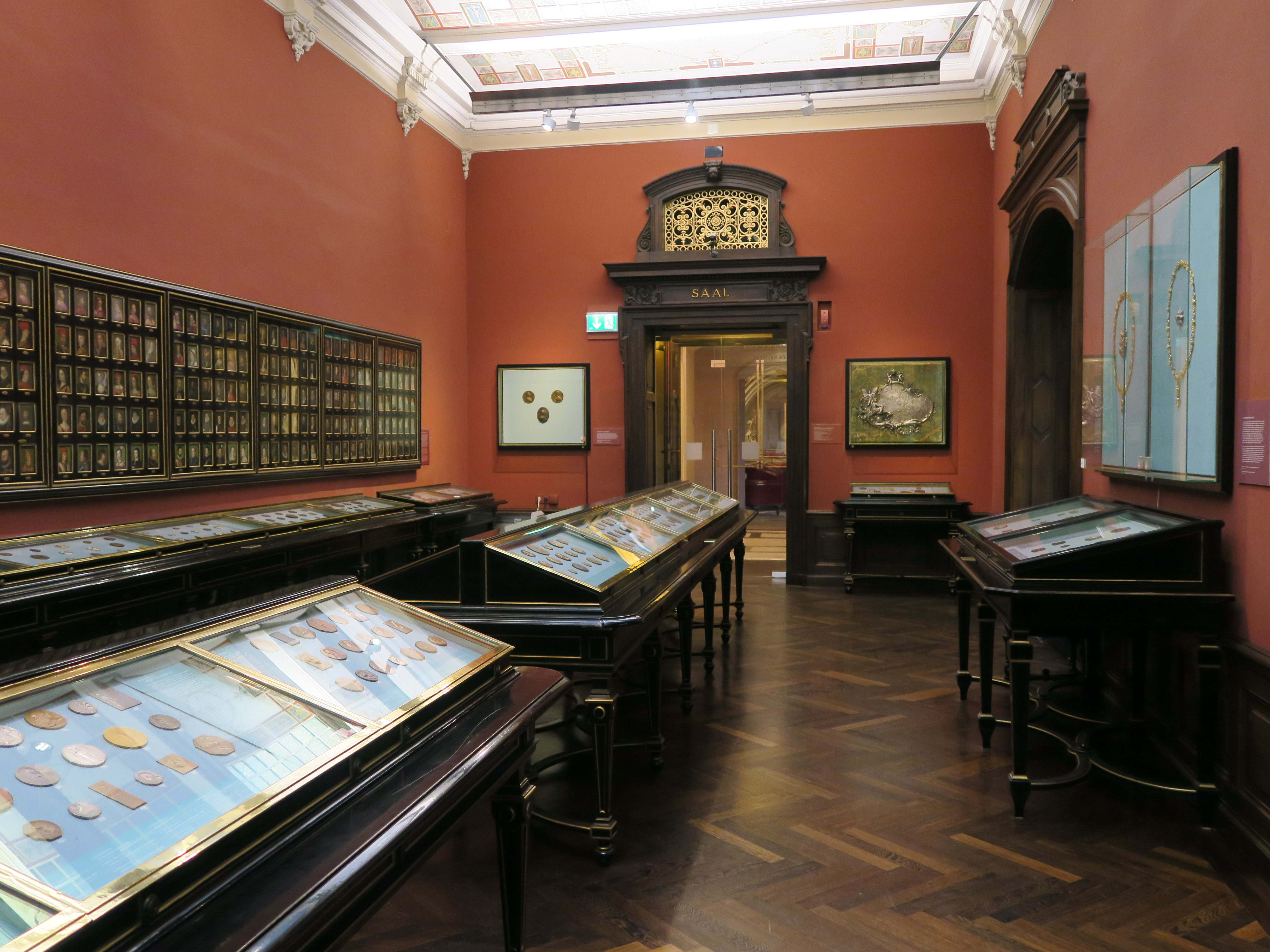 Hauptraum im Münzkabinett des Kunsthistorischen Museums Wien mit Tischreihen in der Mitte und den Seiten